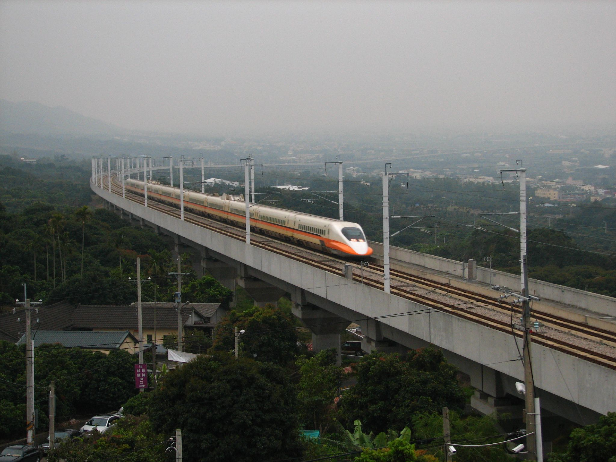 臺灣高鐵700T型電聯車離開平原路段後，隨即以急彎方式一路向上爬升，準備穿過八卦山山脈。本照片攝於2008年，當時臺灣高鐵彰化車站尚未興建。